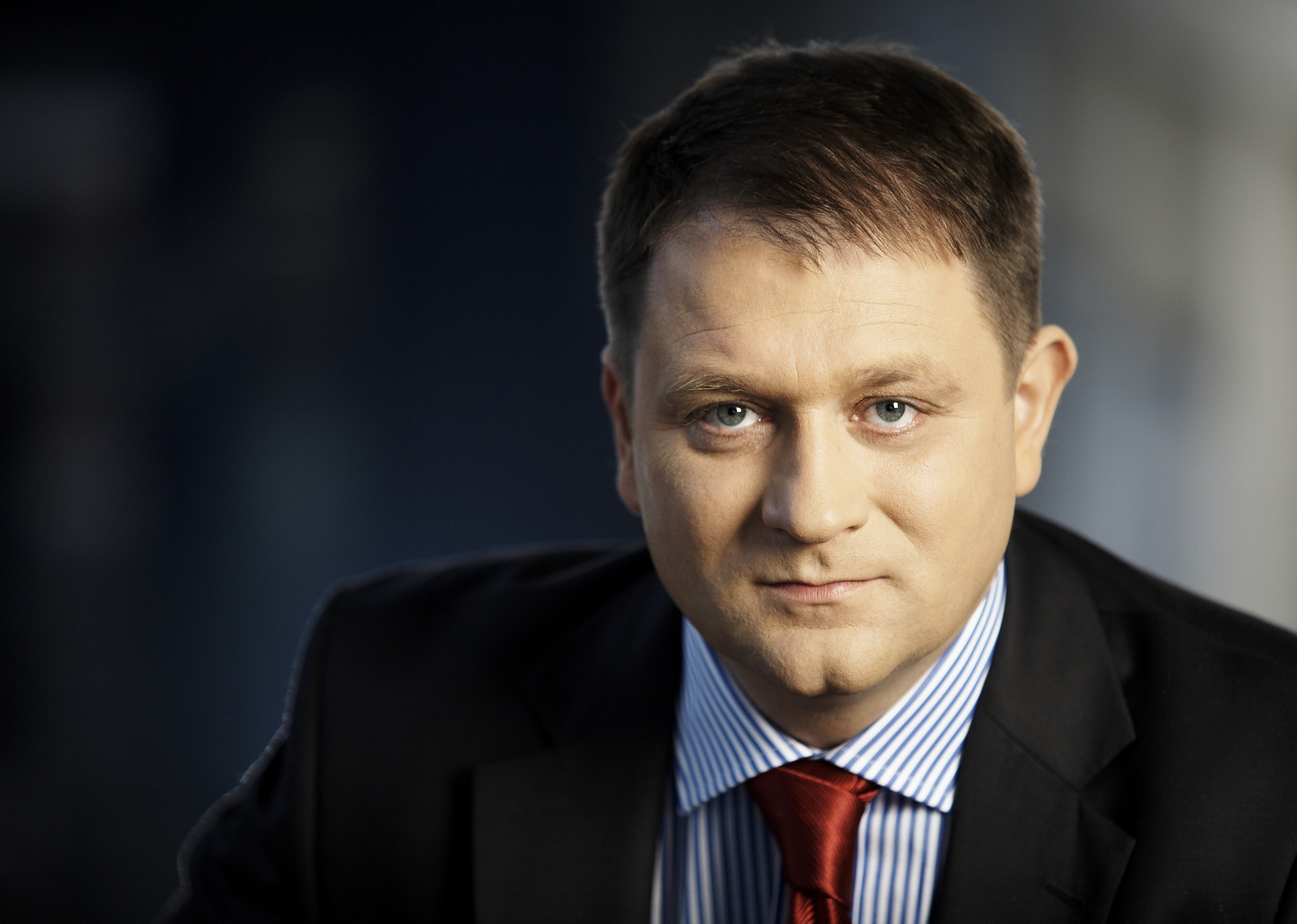 Dariusz Bogdan